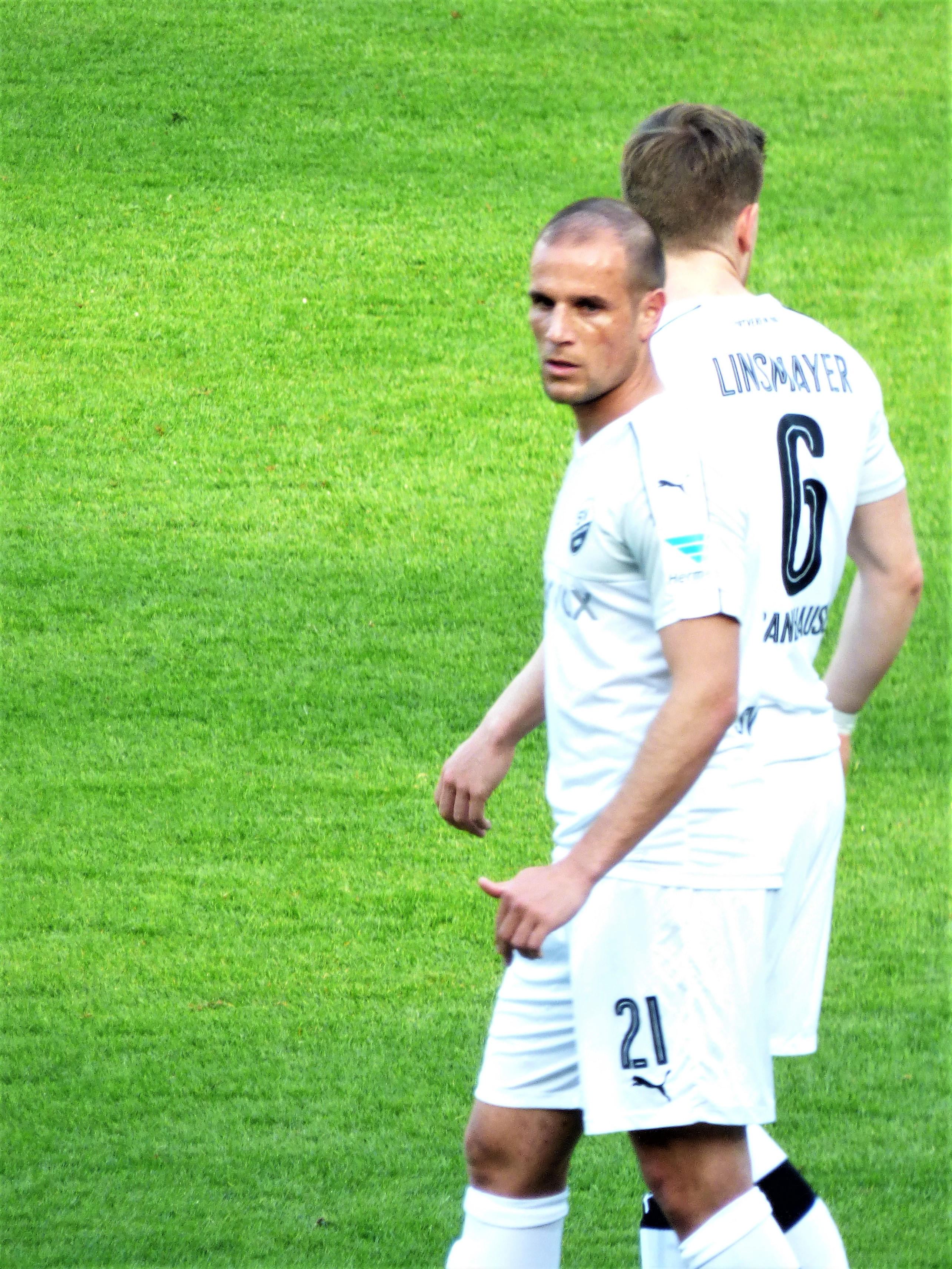 Manuel Stiefler 2017